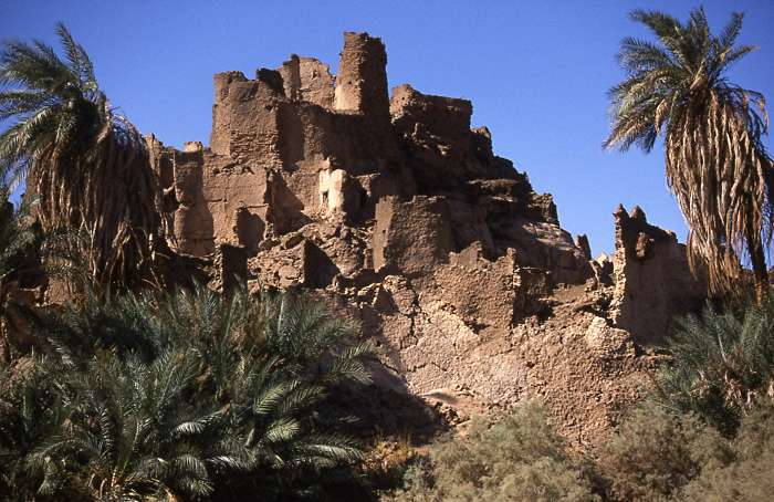 Ruinen der Lehmbauhäuser von Djado, der vor Jahrhunderten verlassenen Stadt im Nordosten von Niger.